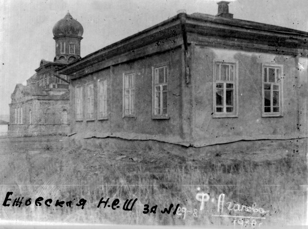 Область Войска Донского, Хопёрский округ, хутор Ежовка, Георгиевская церковь (на переднем плане - Ежовская школа № 1).